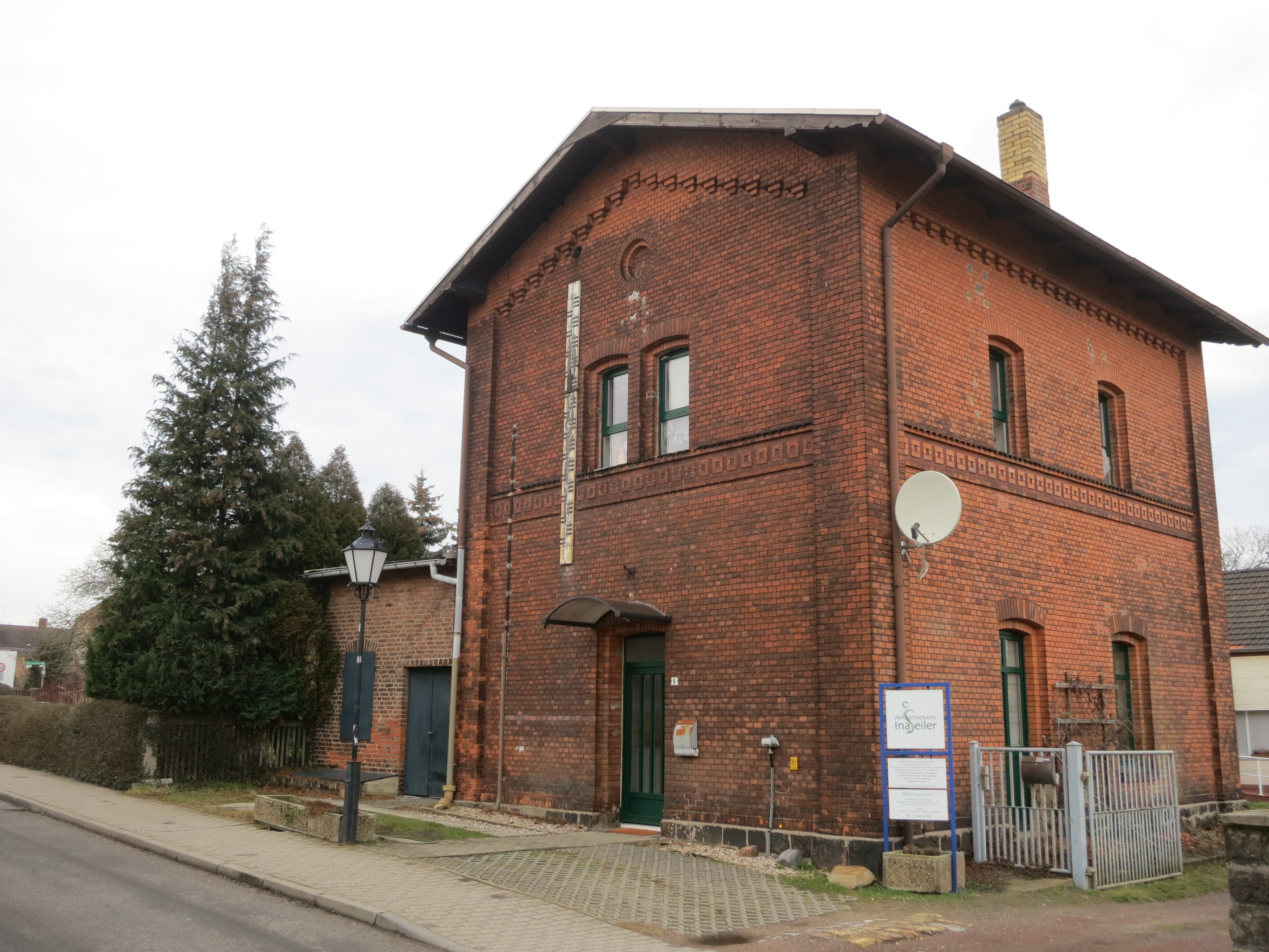 Bahnhof Bad Belzig, denkmalgeschützte Wasserstation